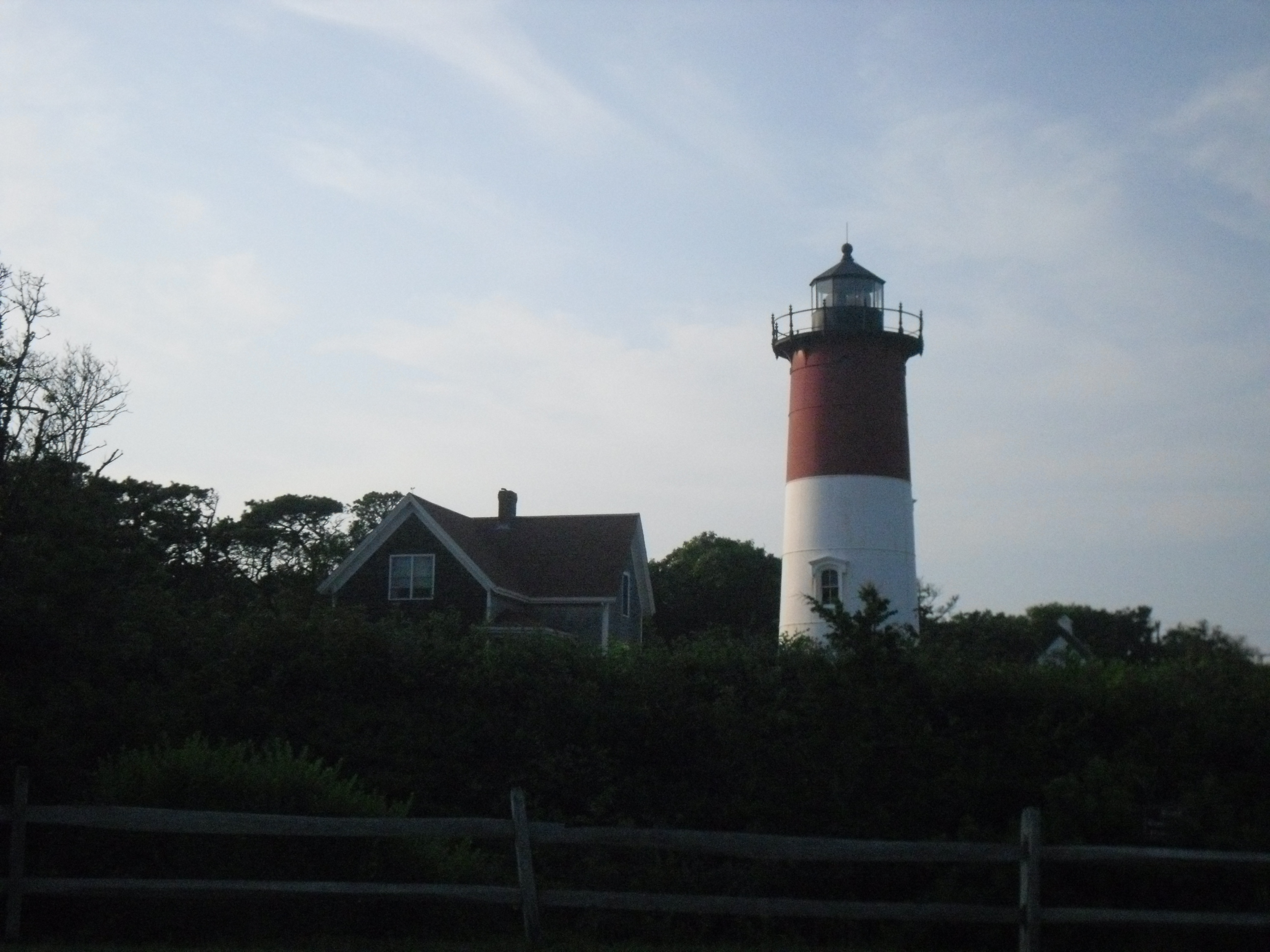 de vuurtoren op Cape Cod